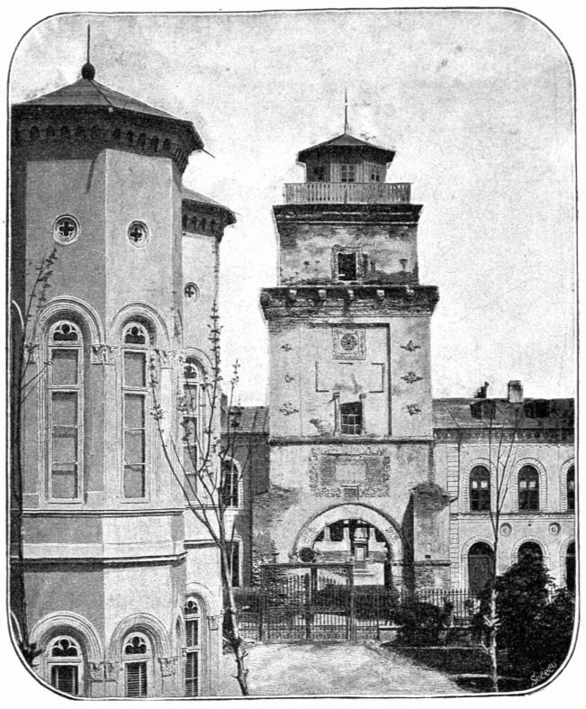 Turnul Colței construit în anul 1715